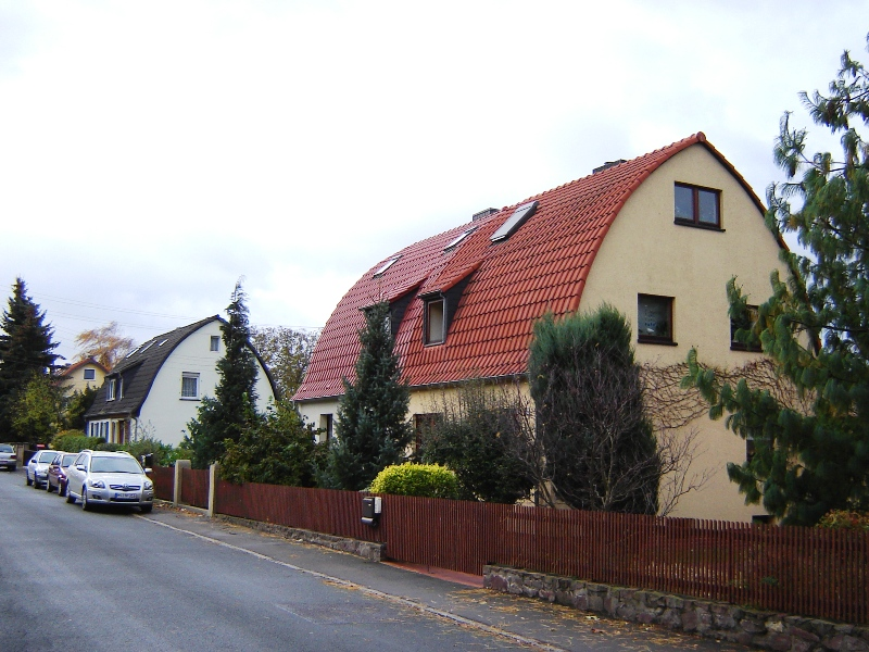 Knoblauch-Siedlung in Magdeburg-Westerhüsen, Häuser mit Zollingerdach